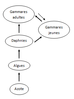 Image réseau trophique aqua particulier